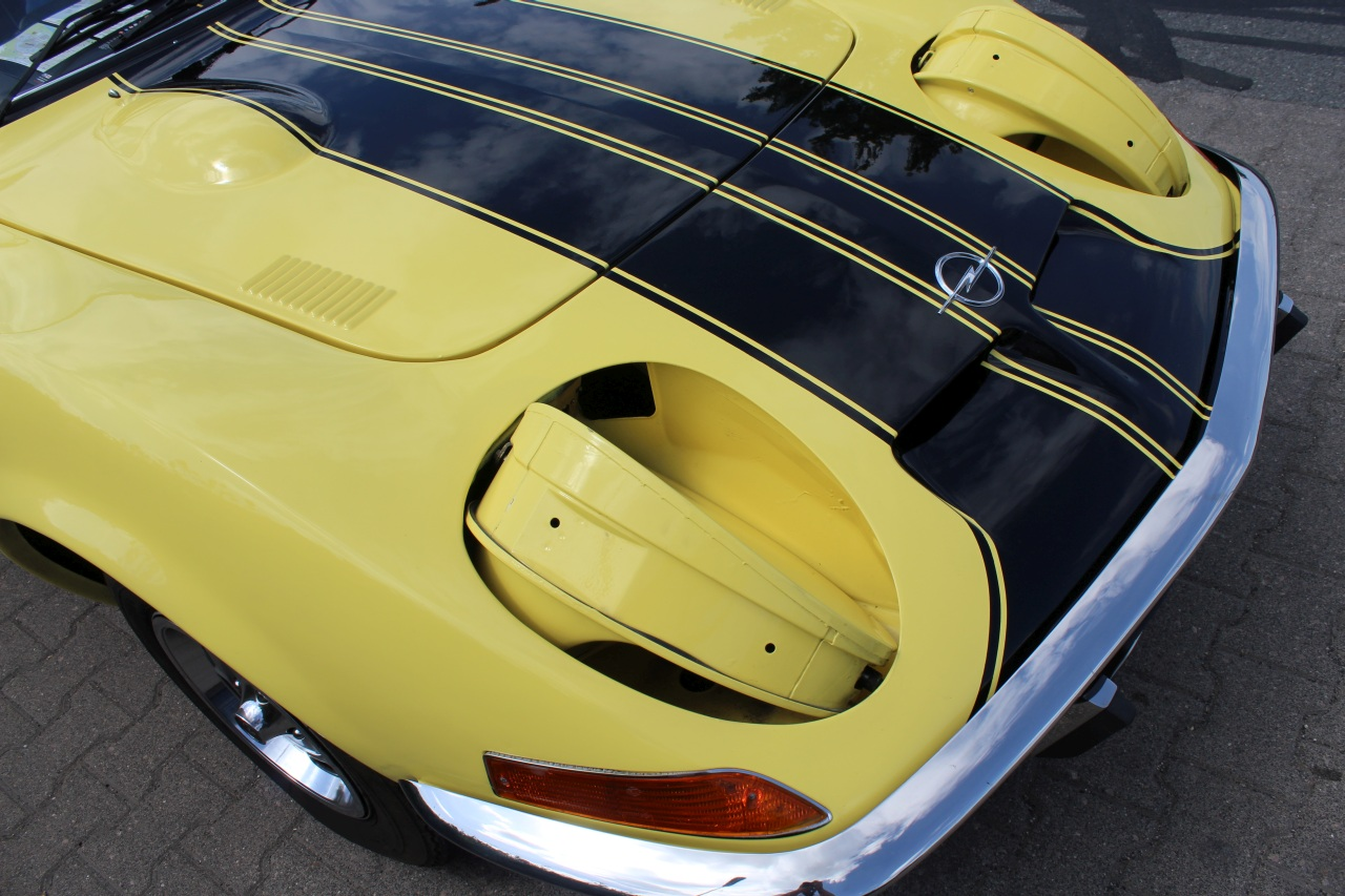 zu Besuch um Opel Designzentrum, Rüsselsheim